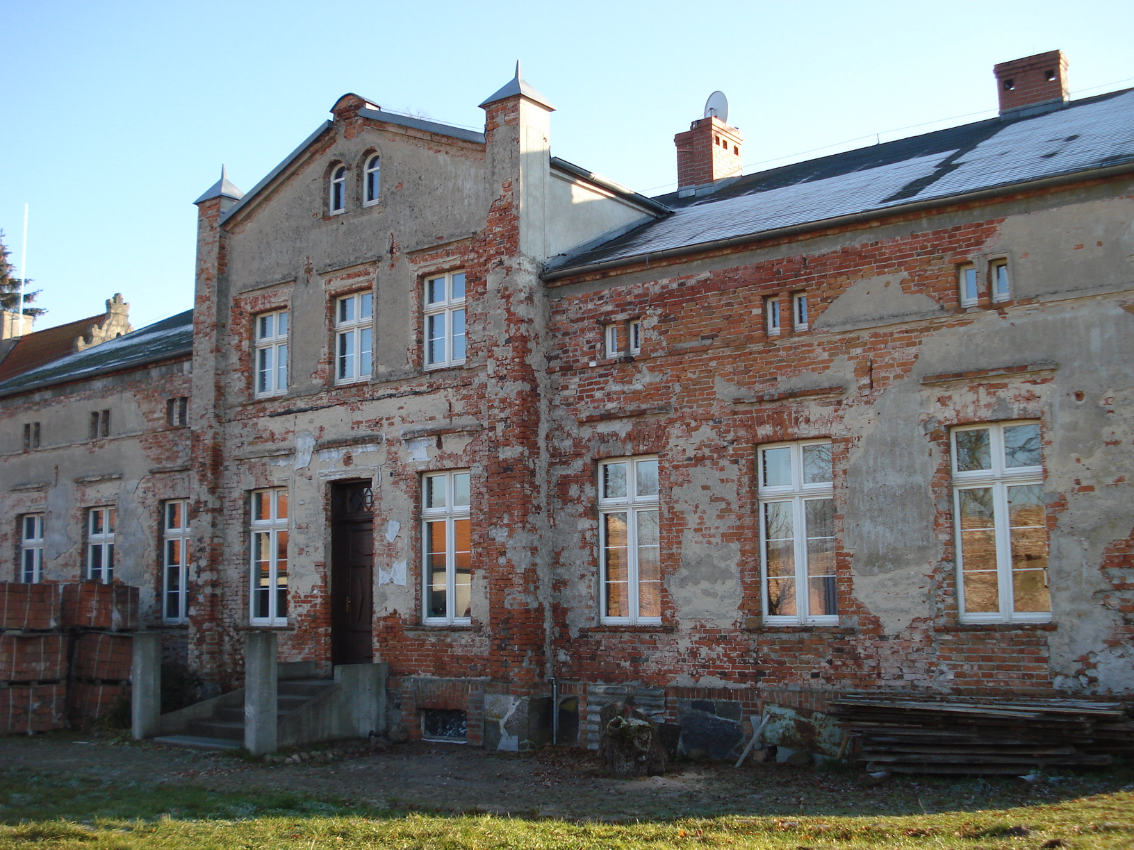 Dwór wybudowany przez Joahima Englera, widok z dziedzińca